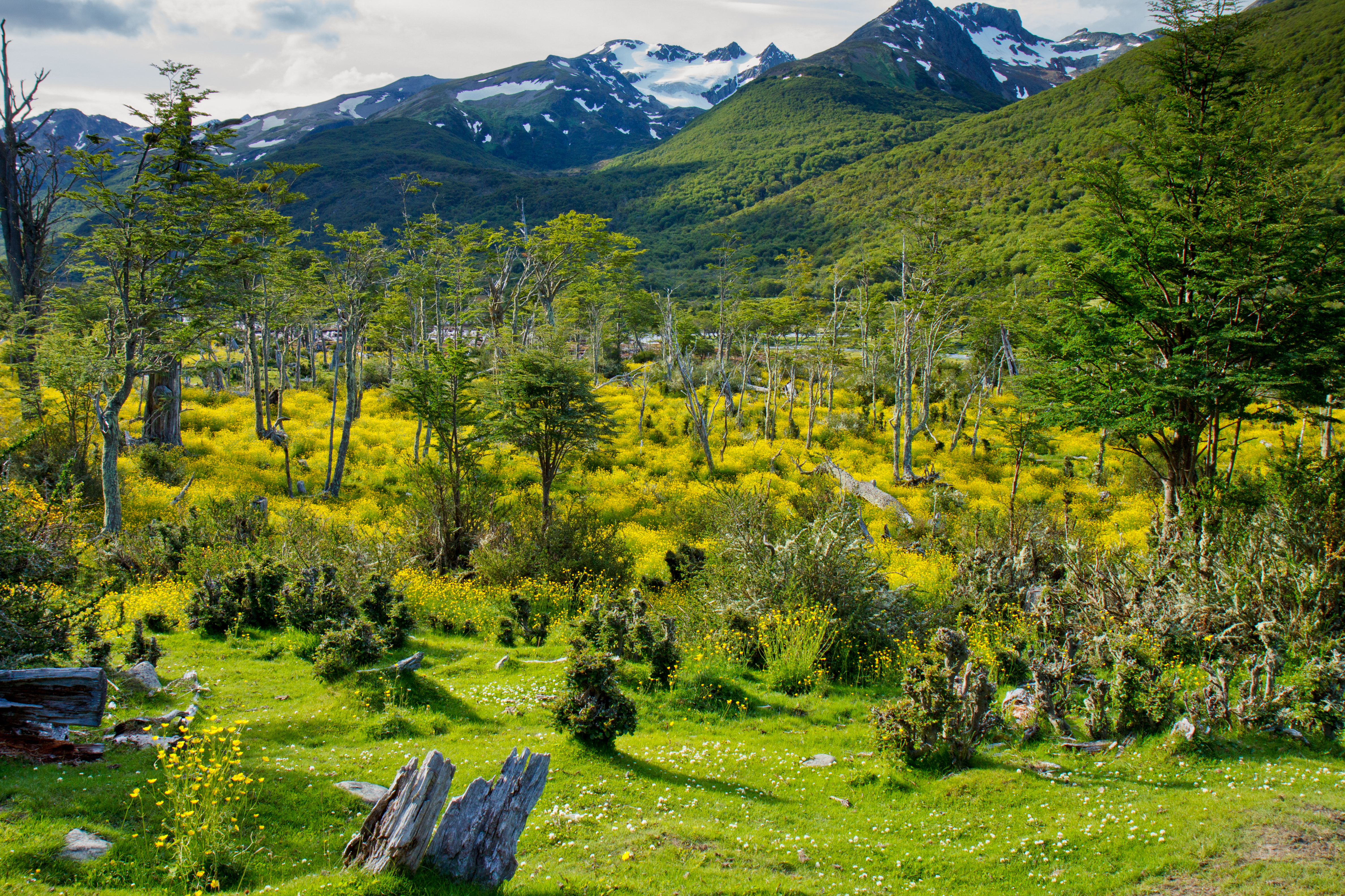 Sheep Pass ('Paso de la Oveja') in Tierra del Fuego National Park, Argentina.